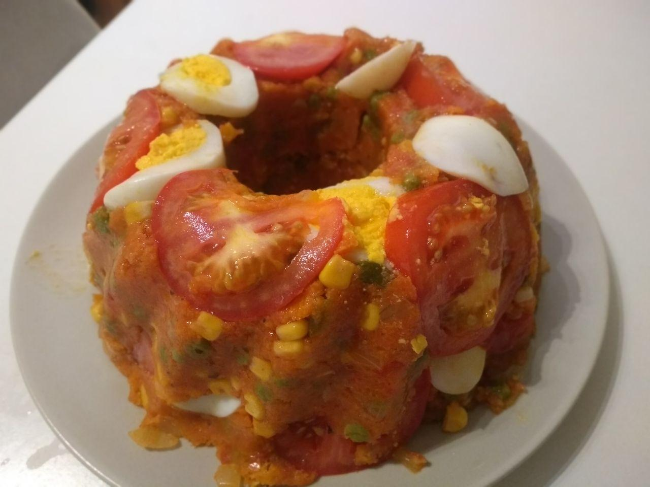 Cuscuz paulista de vegetais.